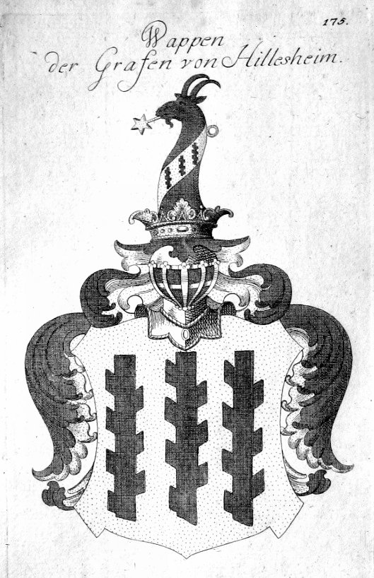 Wappen des deutschen Grafengeschlechtes "von Hillesheim"